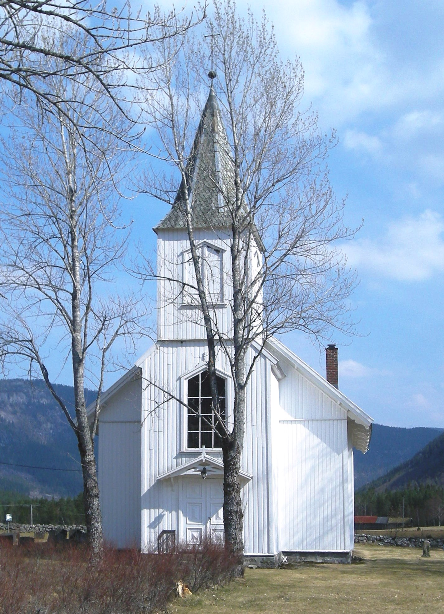 Austad kirke i Bygland kommune